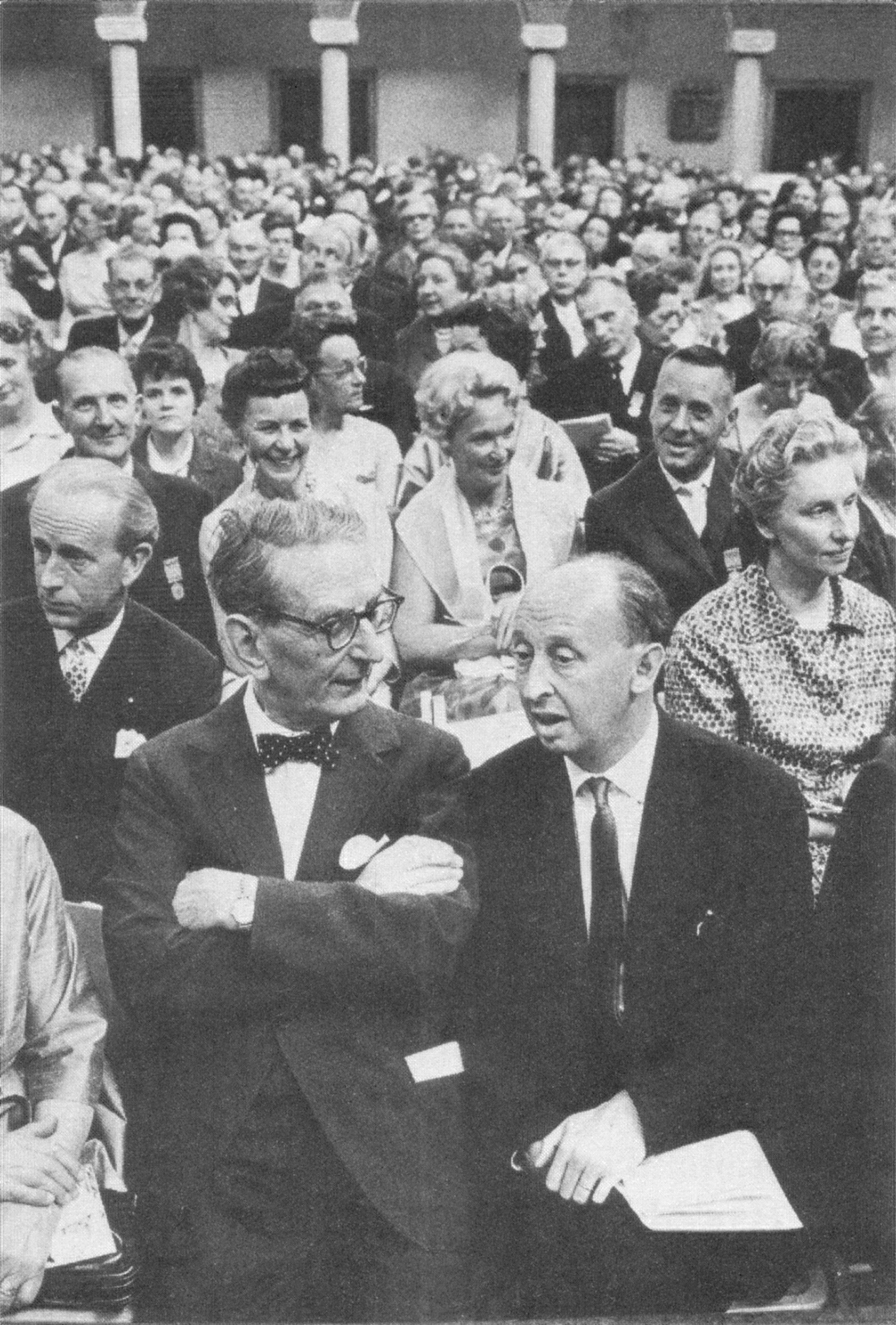 "Hjalmar Mehr torde ha anförtrott mig a majoritetsledares bekymmer -foto från den tillställning, då Stockholms kommunala värld, herrar och festkladda damer, firade stadshusets fytio år (1963)"